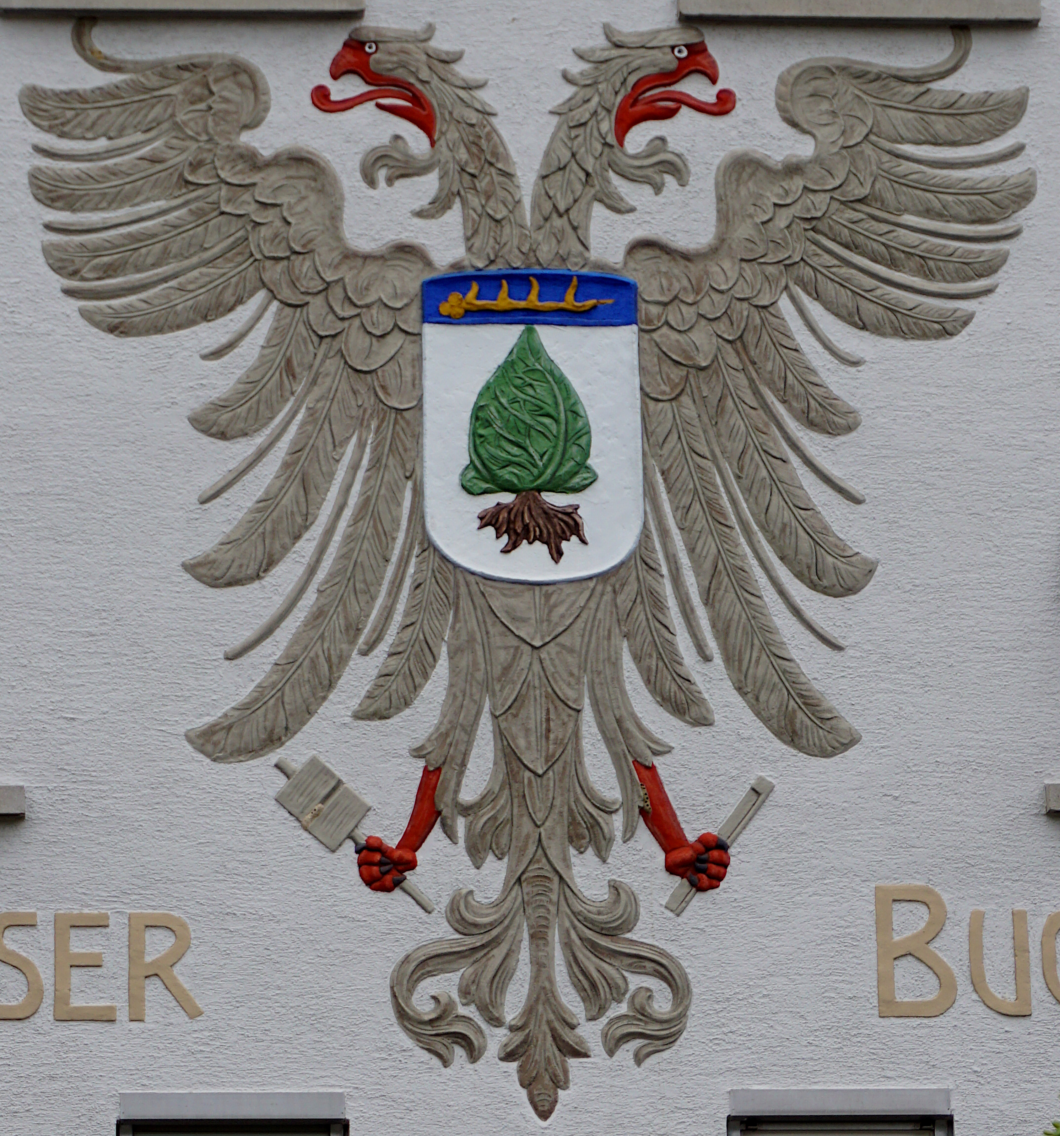 Metzinger Wappen an einer Hauswand.